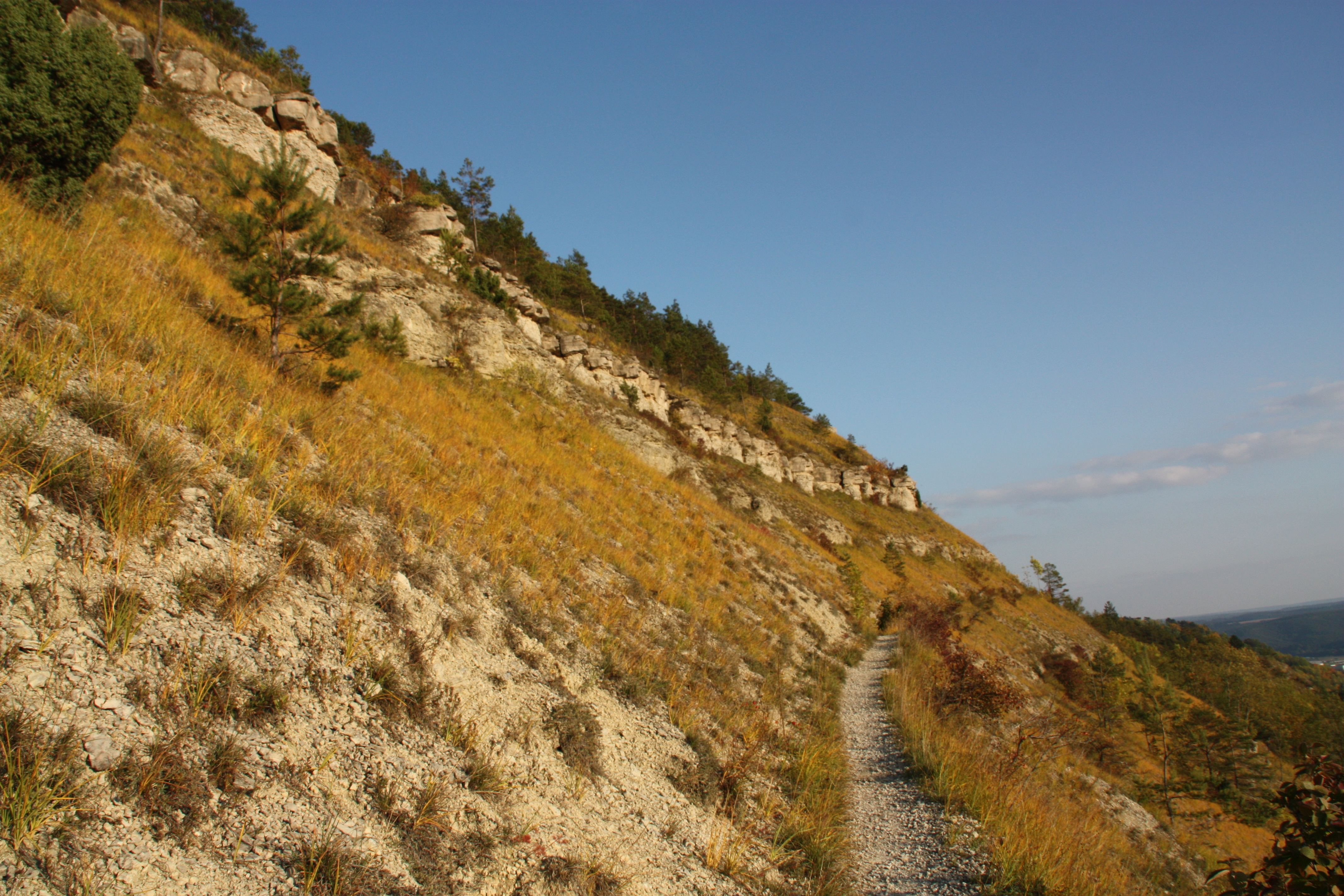 Jena-Lobeda, Johannisberg. Blick von der mittleren Horizontale auf die Muschelkalkbänke (nach Süden).